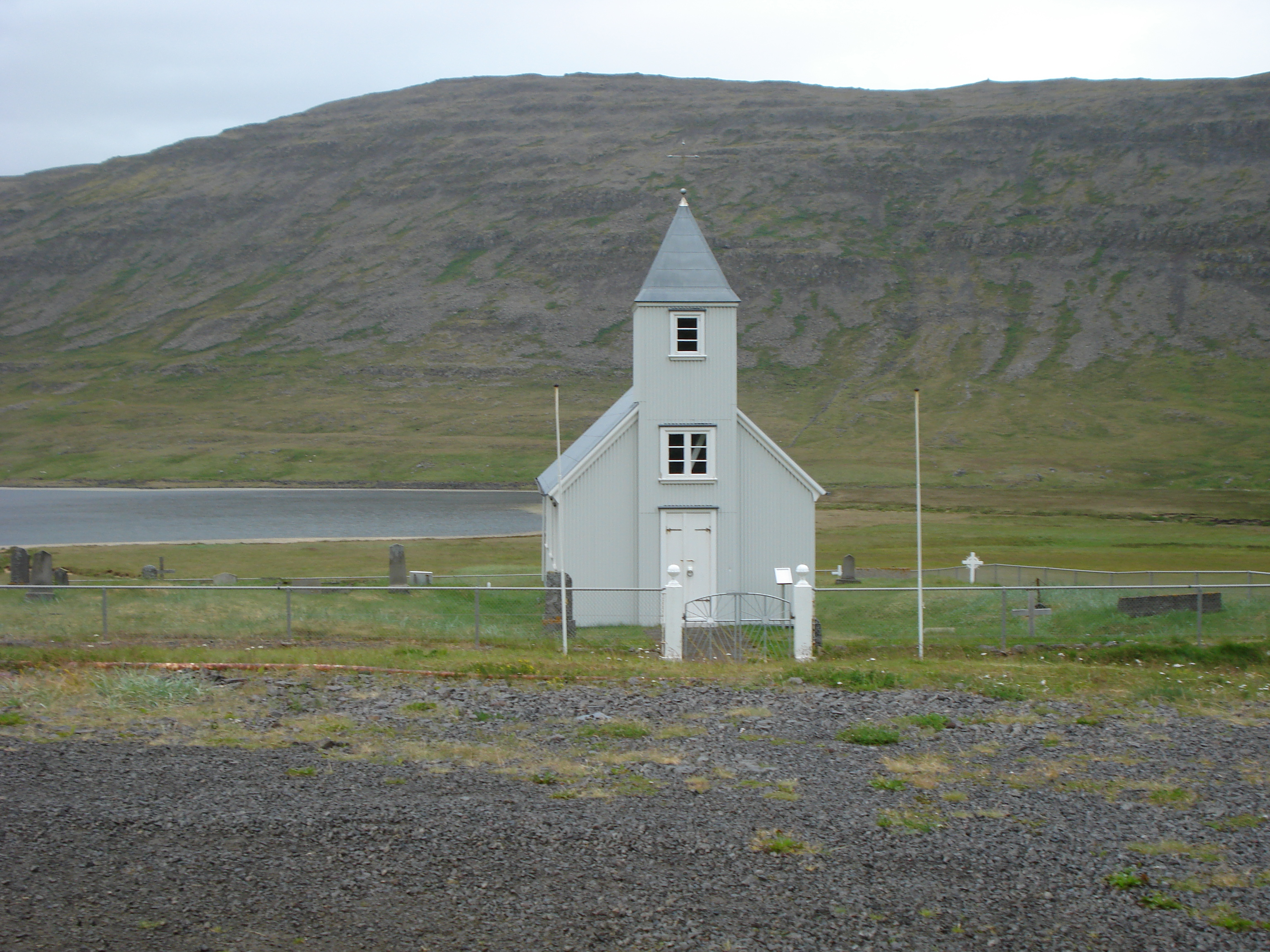 Sauðlauksdalskirkja er í Patreksfjarðarprestakalli í Barðastrandarprófastsdæmi. Sauðlauksdalur er bær, kirkjustaður og prestssetur í stuttu dalverpi við sunnanverðan Patreksfjörð. Kirkja var reist 1863. Turninum var bætt framan á kirkjuna á árunum 1901-02. Church Sauðlauksdalur, Iceland